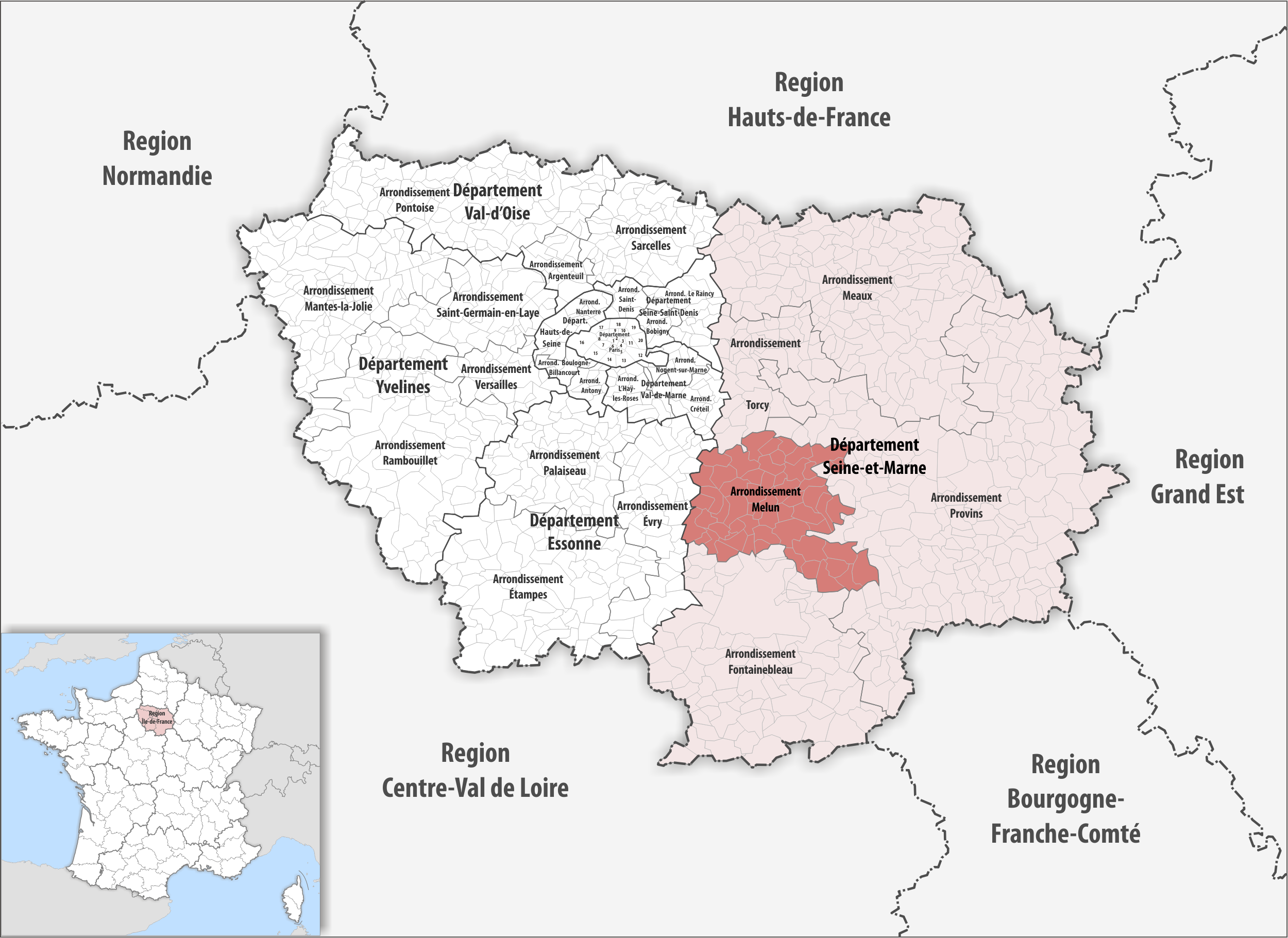 Lage des Arrondissements Melun